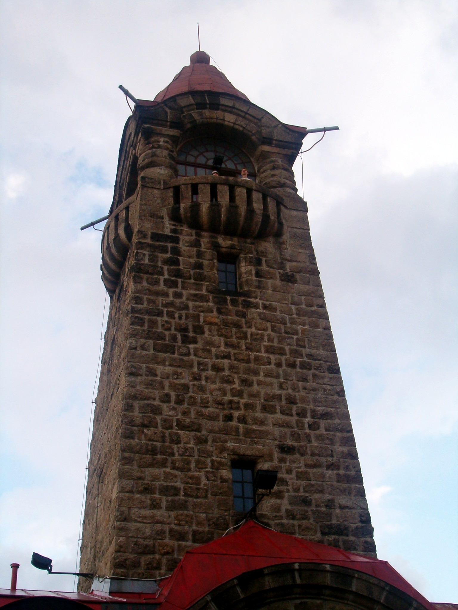 rozhledna Černá studnice